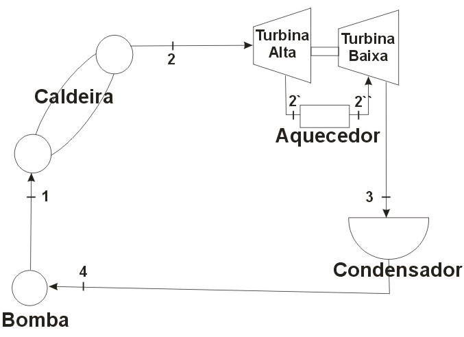 Esboço do ciclo Rankine com Reaquecimento